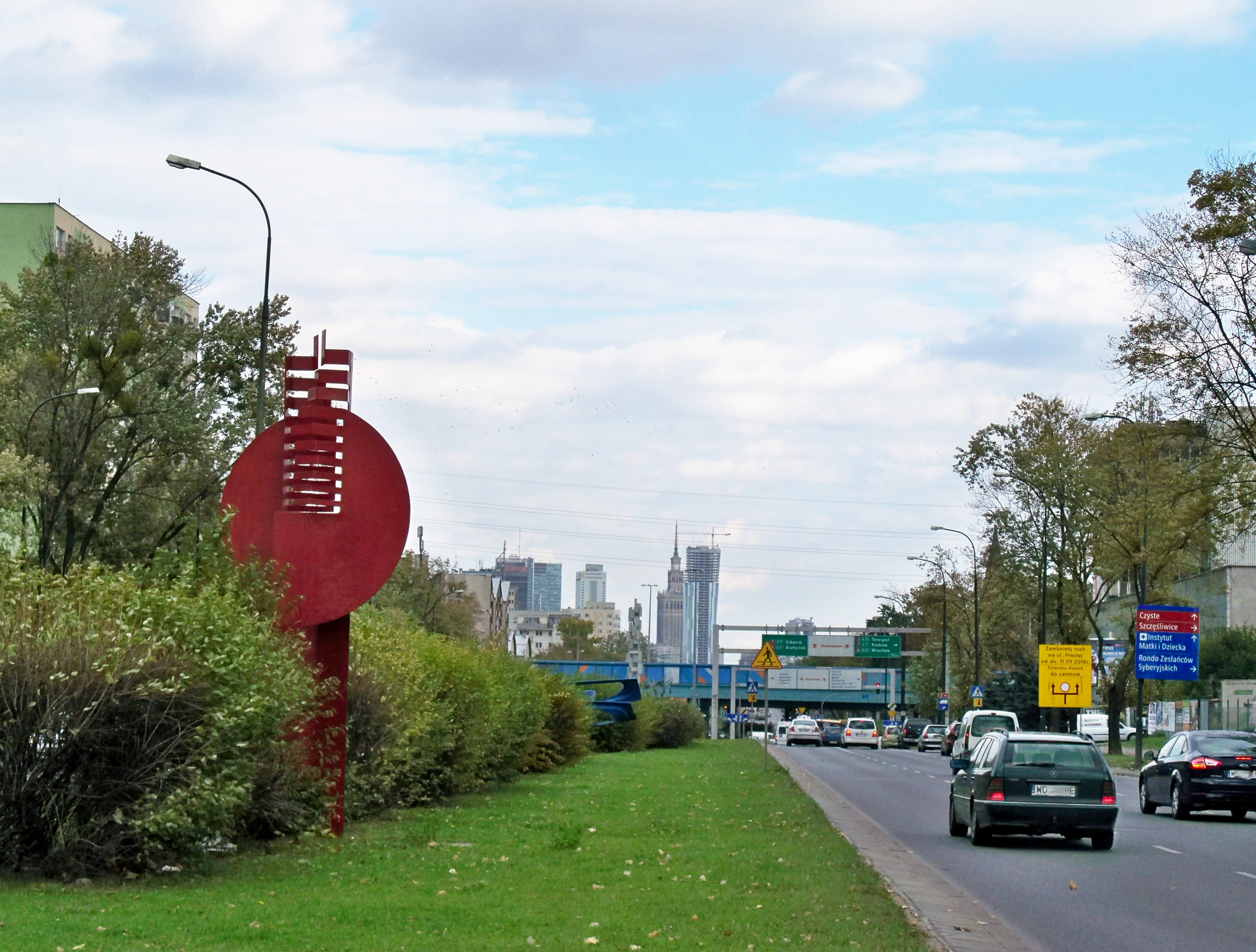 Biennal. Maciej Szańkowski. Jedna z rzeźb Galerii Samochodowej w Warszawie.